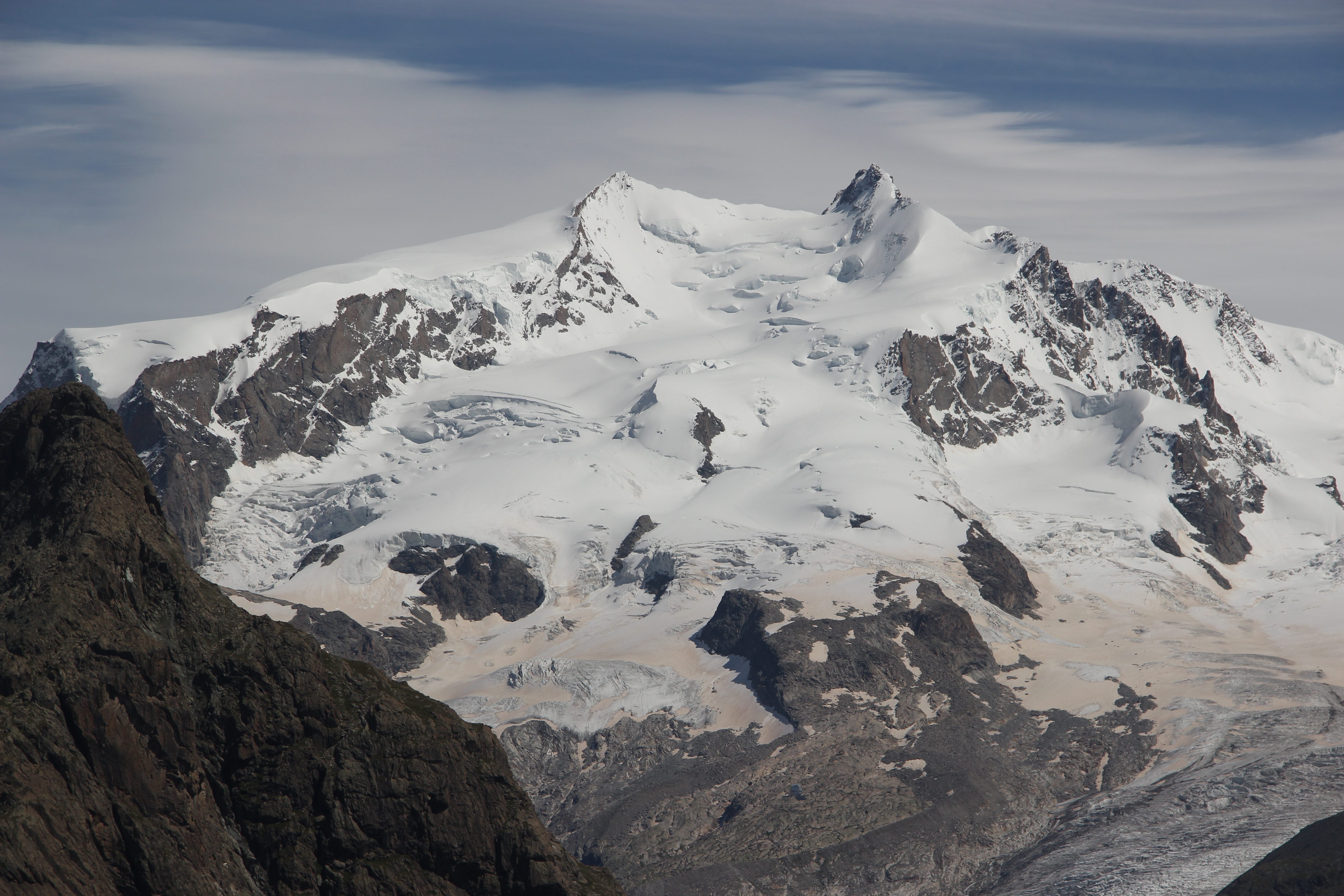 Nordend and Dufourspitze